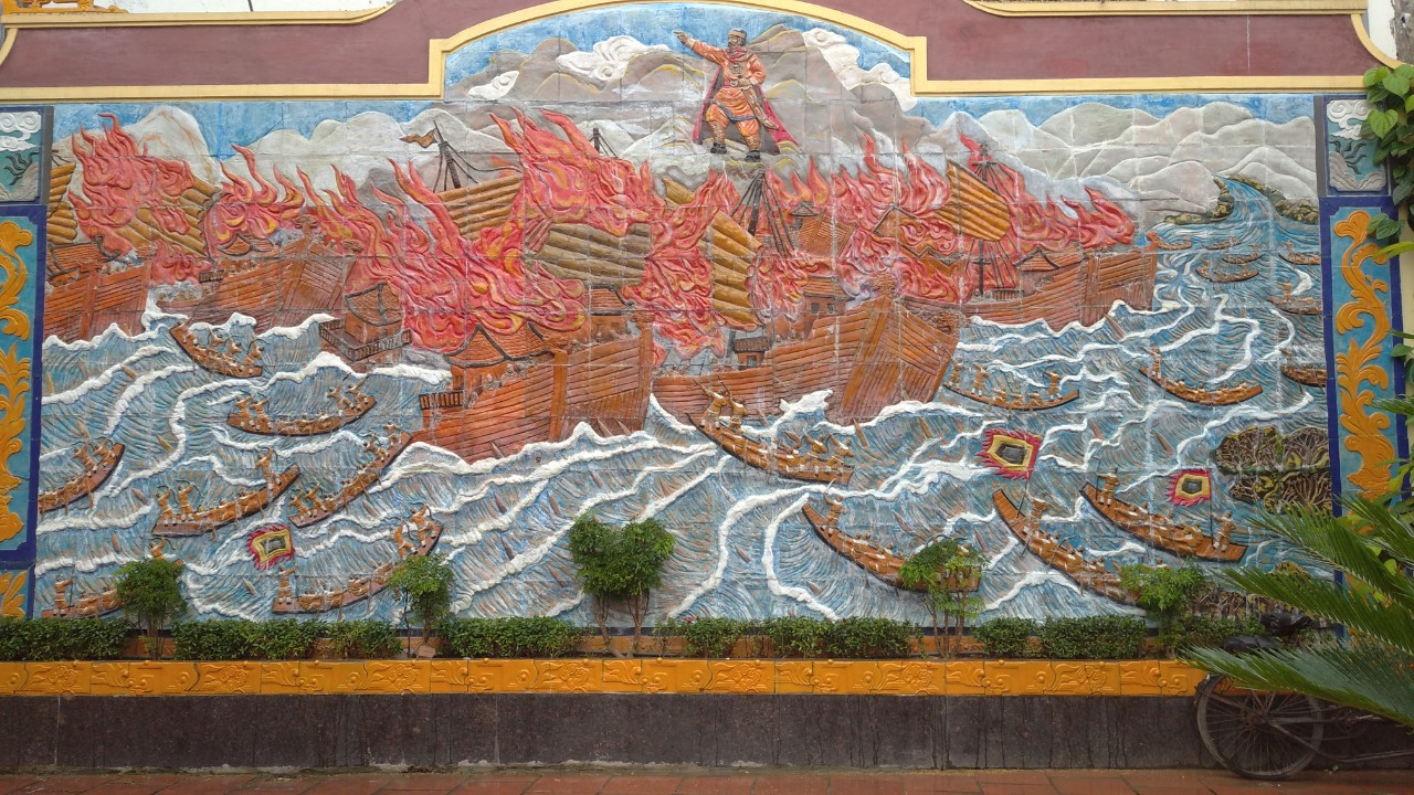 bức tranh ghép đá mô phỏng trận đánh trên sông Bạch Đằng năm 938 giữa Tĩnh Hải quân và Nam Hán, chụp tại đình Lạc Viên địa chỉ ngõ 165 đường Đà Nẵng phường Lạc Viên quận Ngô Quyền thành phố Hải Phòng.